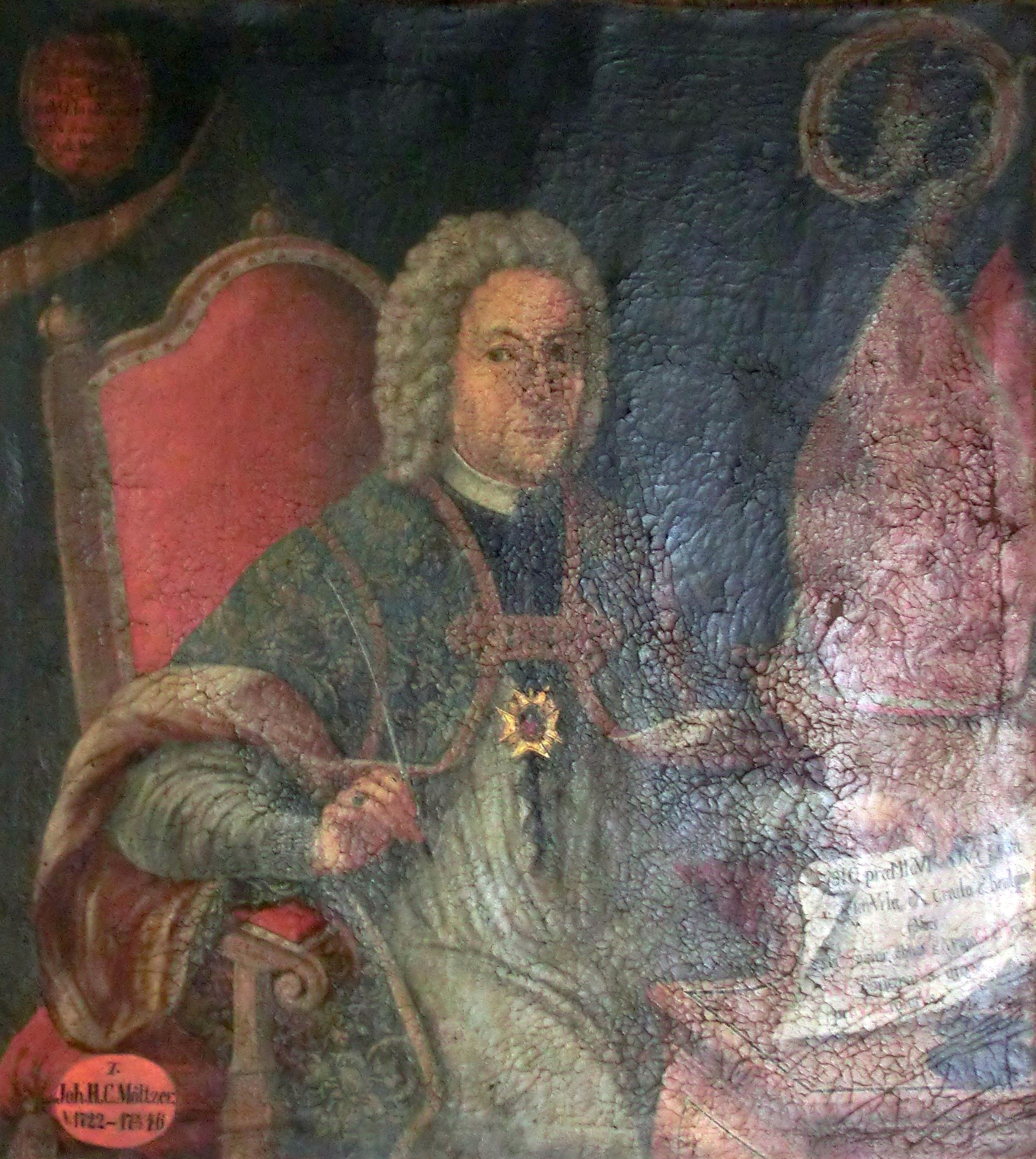 1746 Jan Jindřich Karl Möltzer, 1. infulovaný arciděkan v Horní Polici.